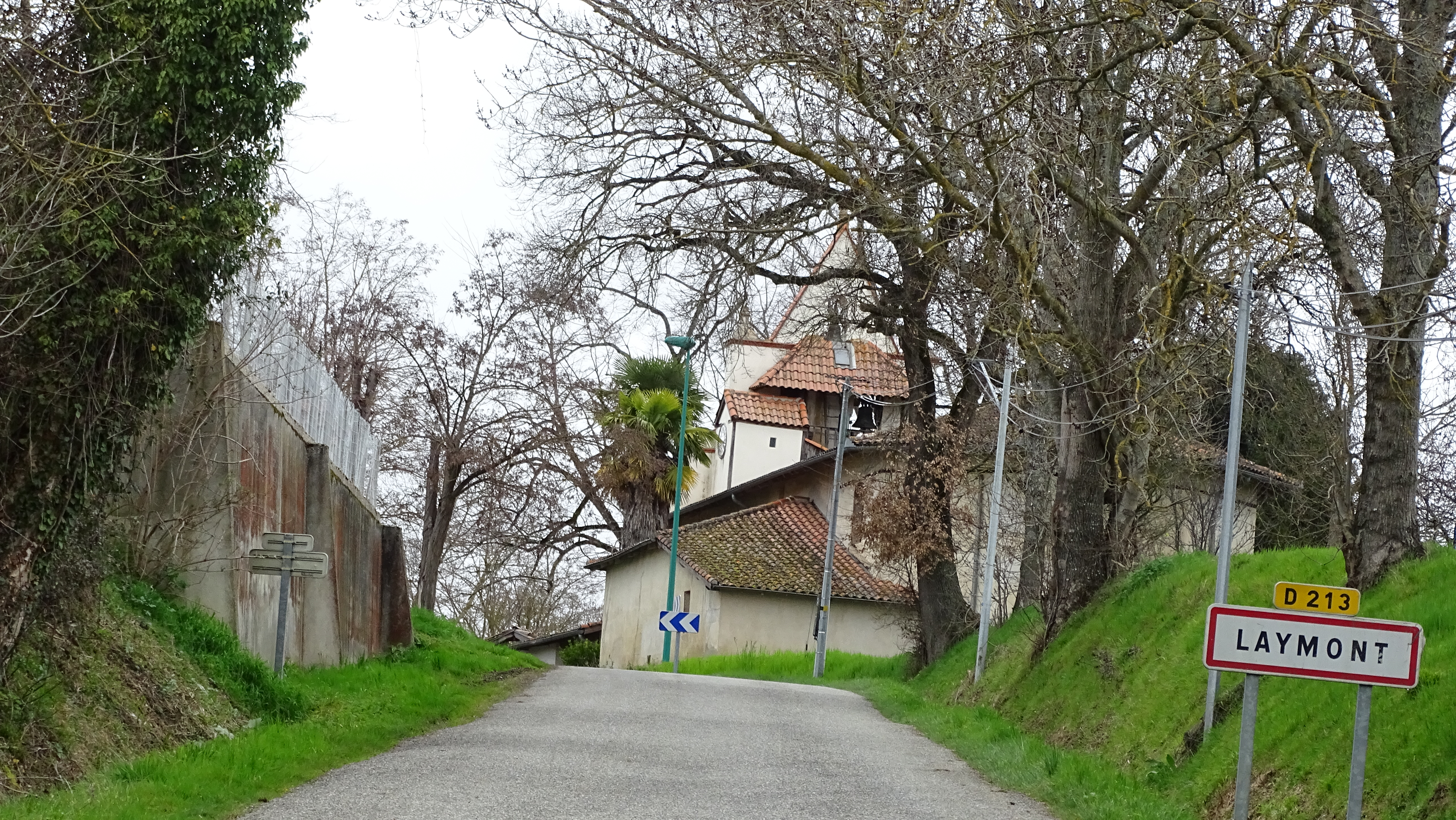 Laymont